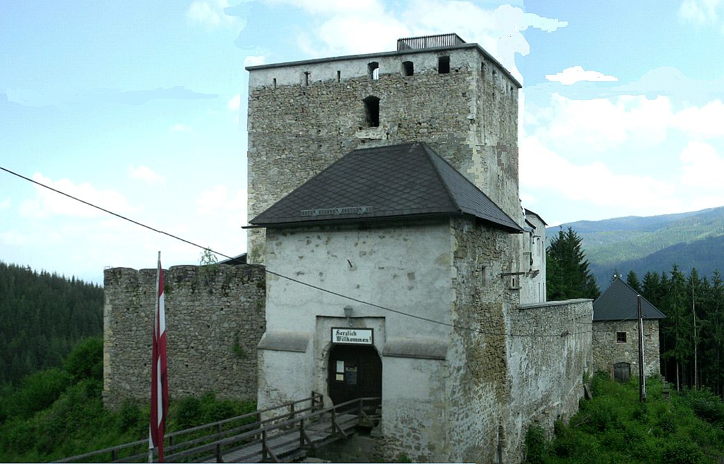 Burgruine Lichtenegg in Wartberg im Mürztal/Österreich. Object location47° 31′ 46.67″ N, 15° 28′ 56.55″ E